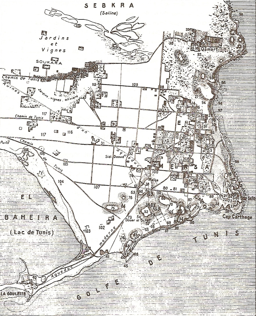 Plano de Cartago elaborado por Christian Tuxen Falbe en 1833